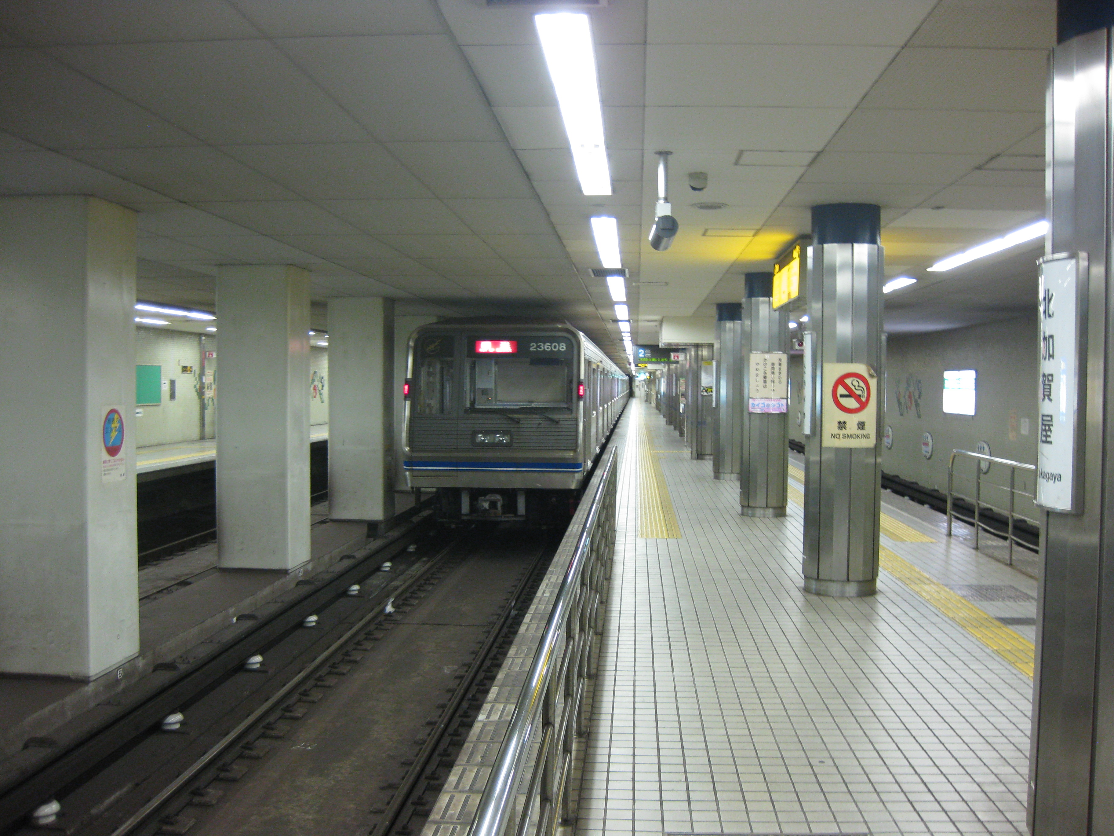 北加賀屋駅プラットホーム